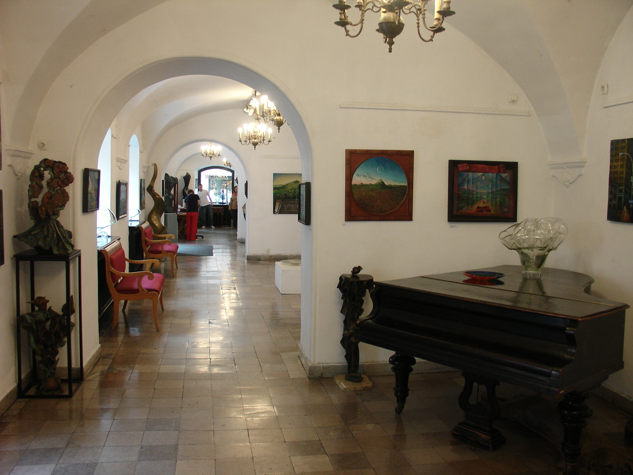 Wnętrze Galerii Zapiecek w Warszawie na Starym Mieście